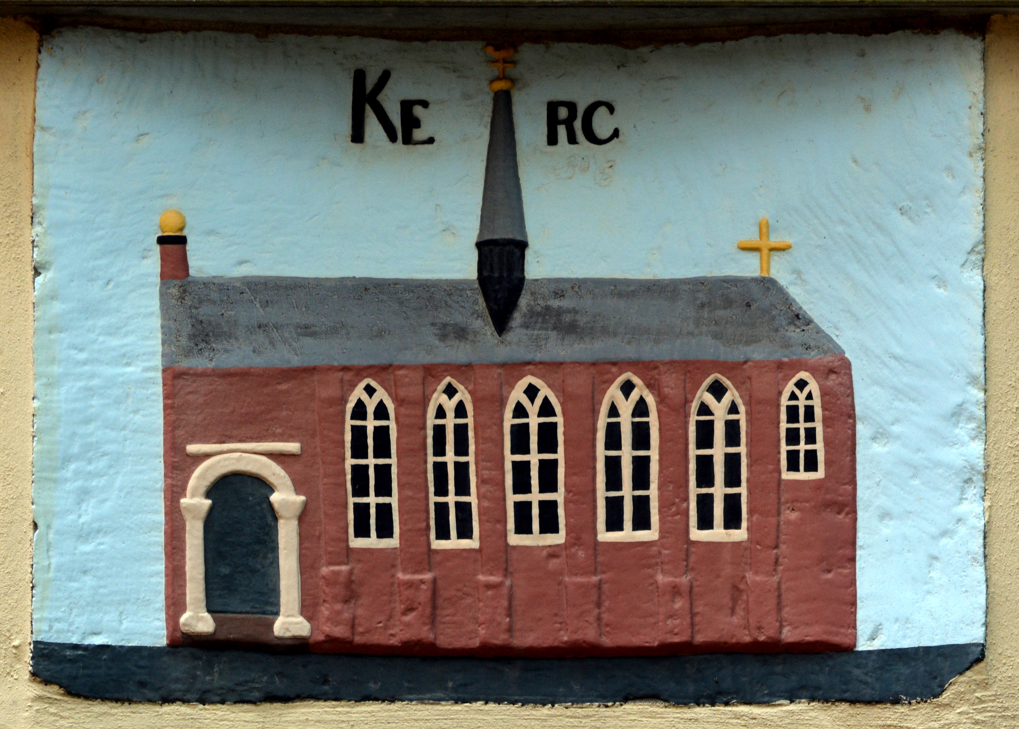 Leeuwarden, Westerkerk, gevelsteen